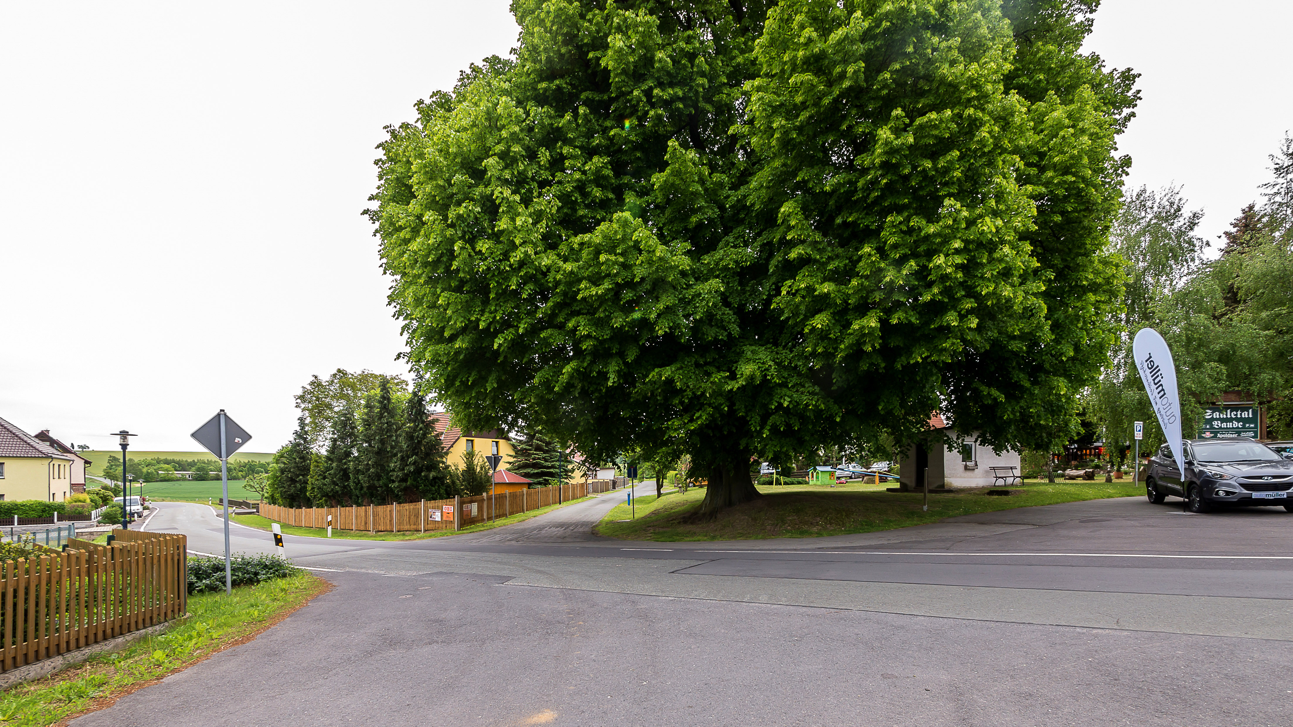 Ortslage von Kalte Schenke mit einer als Naturdenkmal geschützten Sommerlinde (Tilia platyphyllos; ND SOK 01)